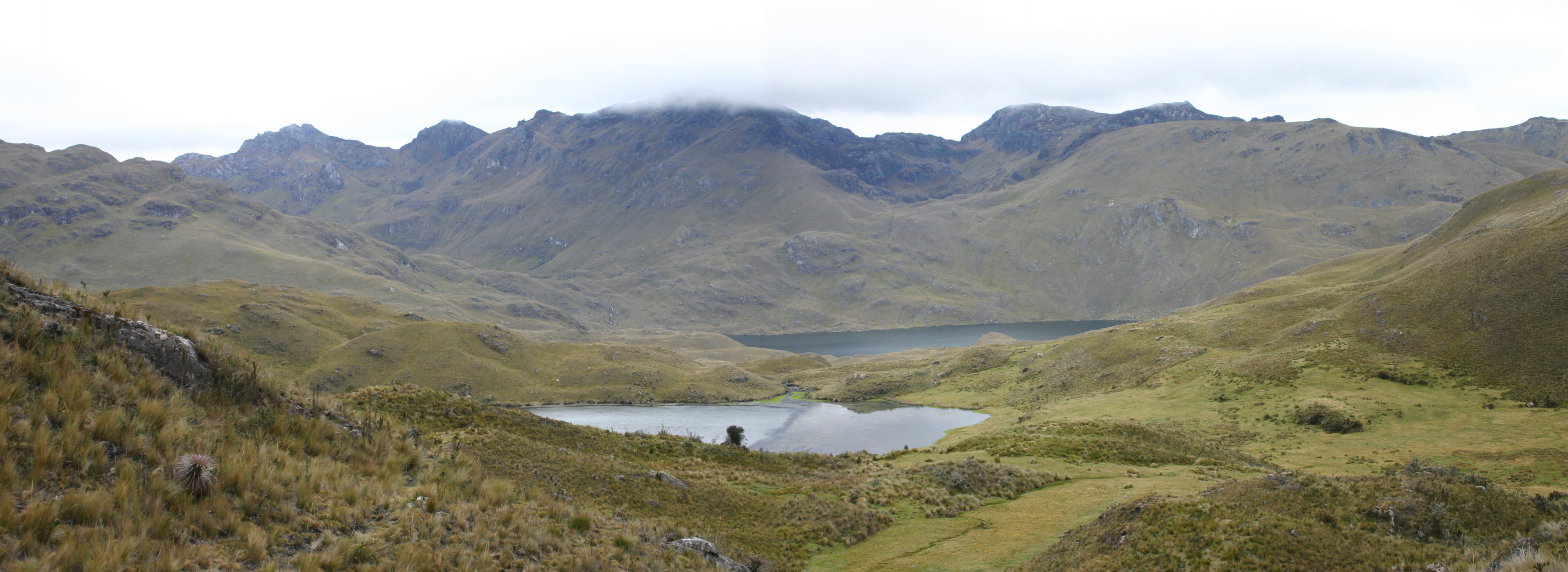 Eigen werk, Ecuador, oktober 2005